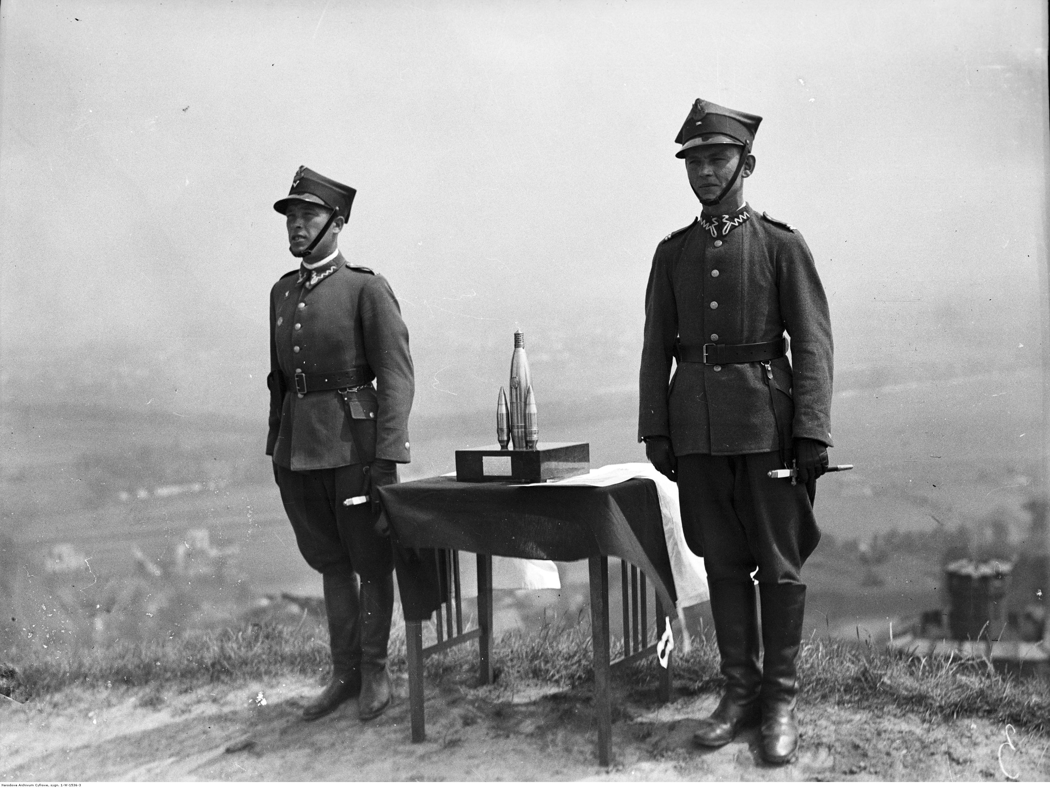 Święto 5. Dywizjonu Artylerii Przeciwlotniczej w Krakowie; lipiec 1936. Warta przy pamiątkowej rzeźbie, przedstawiającej trzy pociski artyleryjskie. Koncern Ilustrowany Kurier Codzienny - Archiwum Ilustracji. Sygnatura: 1-W-1536-3